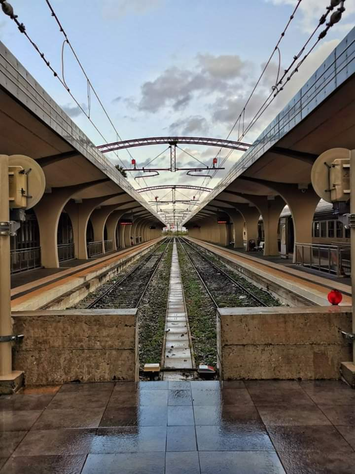 Veduta del binario centrale della stazione ferroviaria di Cosenza in località Vaglio Lise.